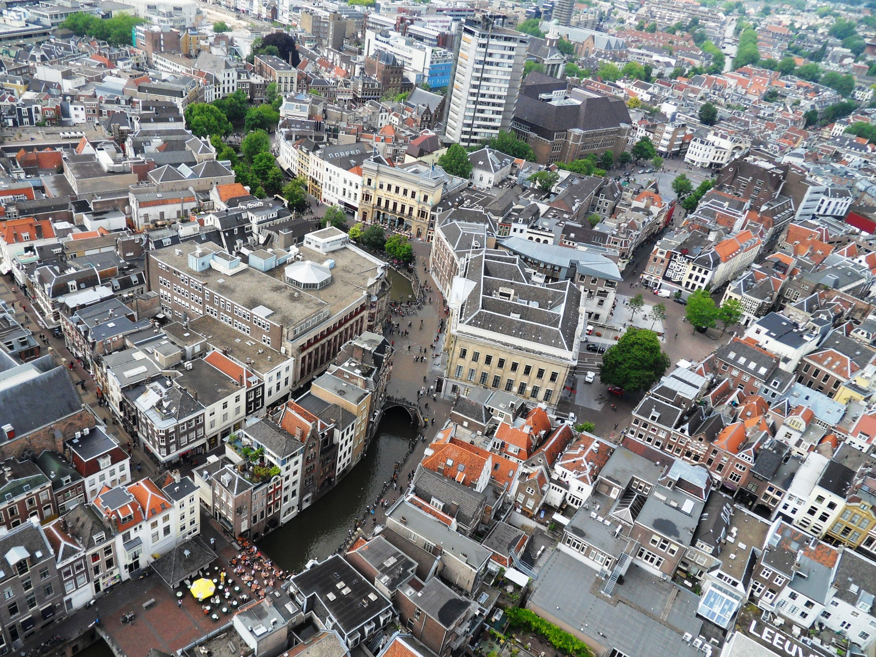 Uitzicht vanuit de Domtoren.